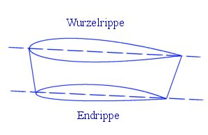 Grafik zur Darstellung aerodynamischer Schränkung